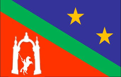 La bandera del municipio Libertador (Carabobo) está dividida en 2 triángulos rectángulos por una diagonal descendente, uno rojo en la parte inferior que simboliza la sangre derramada por los patriotas en en la tierra inmortal en la Batalla de Carabobo y dentro tiene un silueta del arco del triunfo en blanco representando el triunfo de los patriotas en dicha batalla librada en tierras libertadorenses, dentro de este una silueta del Libertador Simon Bolivar a caballo del mismo color, que hace referencia al nombre del municipio, el triangulo superior es de color azul que simboliza el cielo de paz bajo el cual viven los libertadorenses, en el aparecen 2 estrellas amarillas que representan la riqueza de valores y a las 2 parroquias urbanas en que se divide el municipio: Tocuyito e Independencia, y finalmente a lo largo de la diagonal descendiente tenemos una franja verde simbolizando los recursos naturales: flora, fauna e hidrografía, de del municipio Libertador.